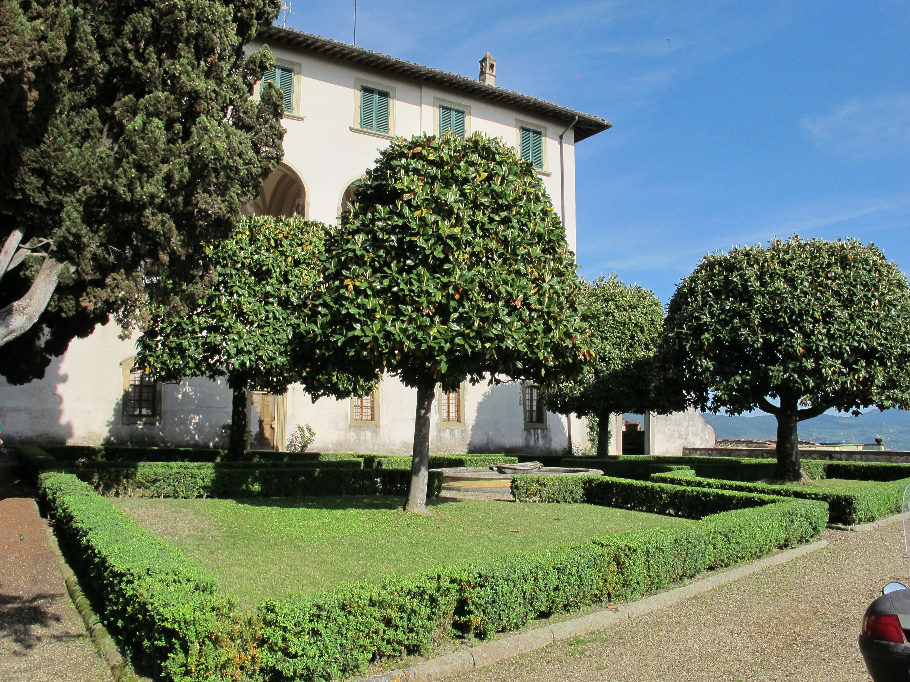 Villa medici di belcanto, parterre anteriore